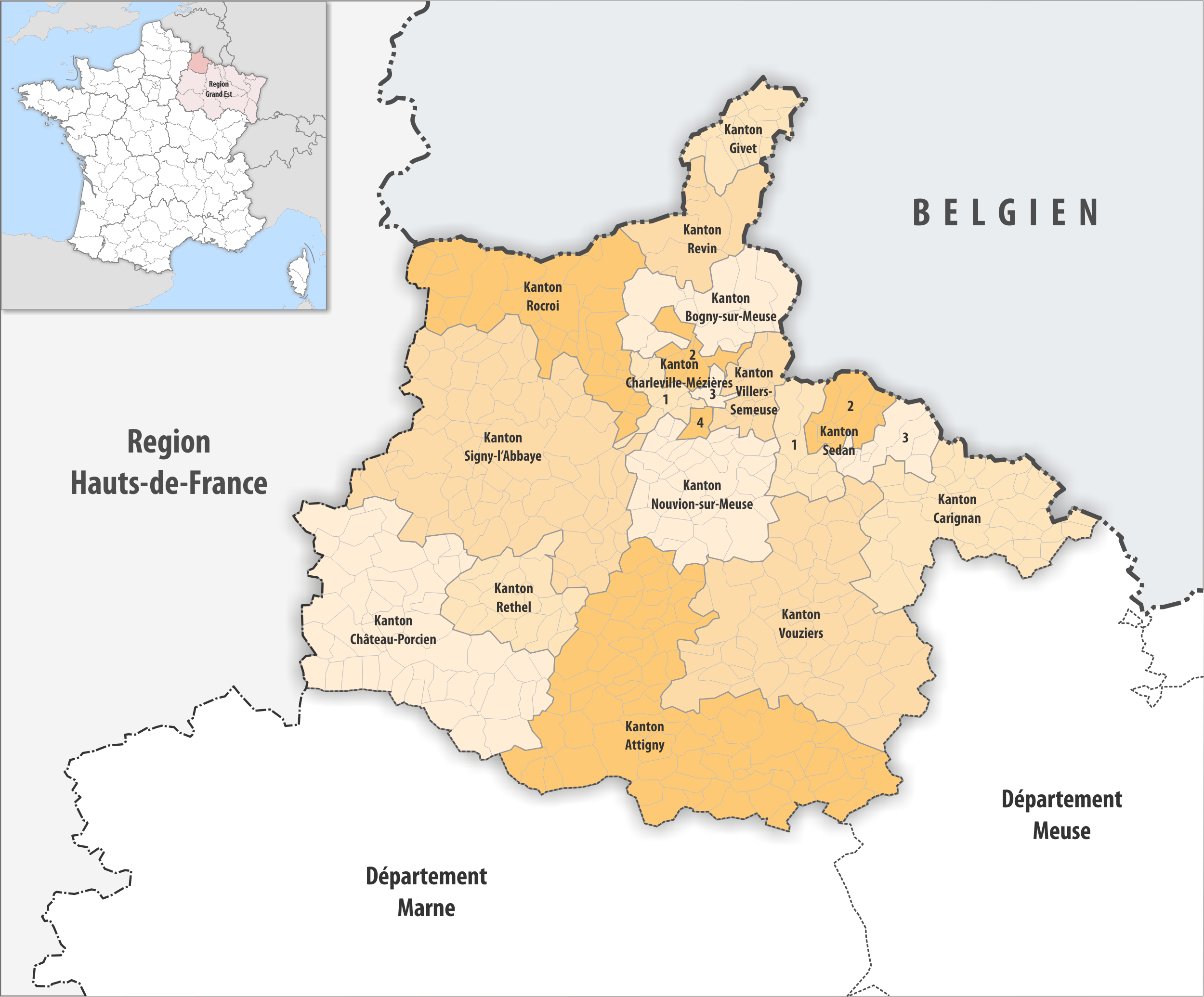 Gemeinden und Kantone im Departement Ardennes